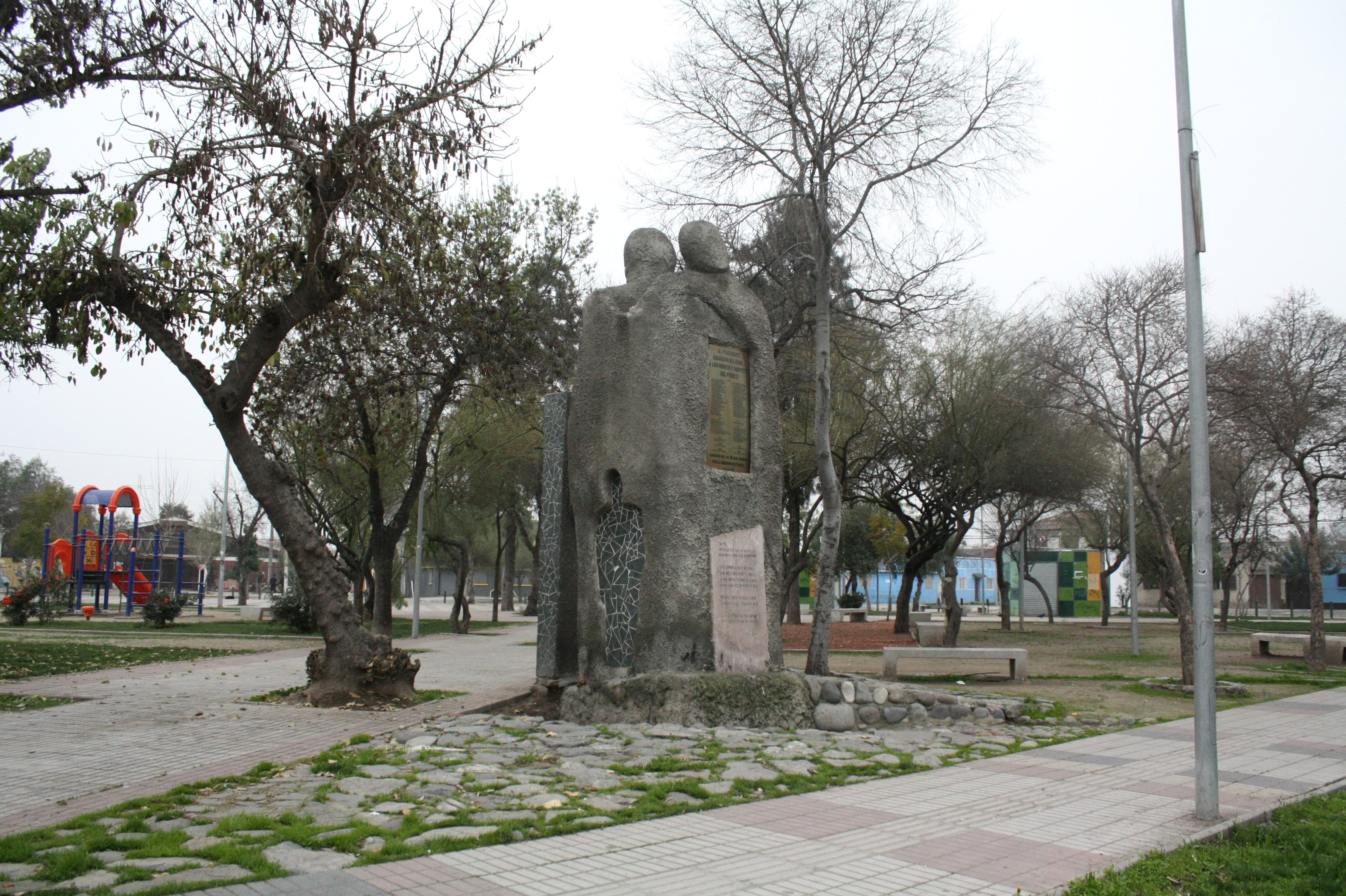 Visión lateral del monumento en la plaza.